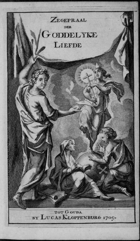 Titelprent van Zegepraal der goddelyke liefde